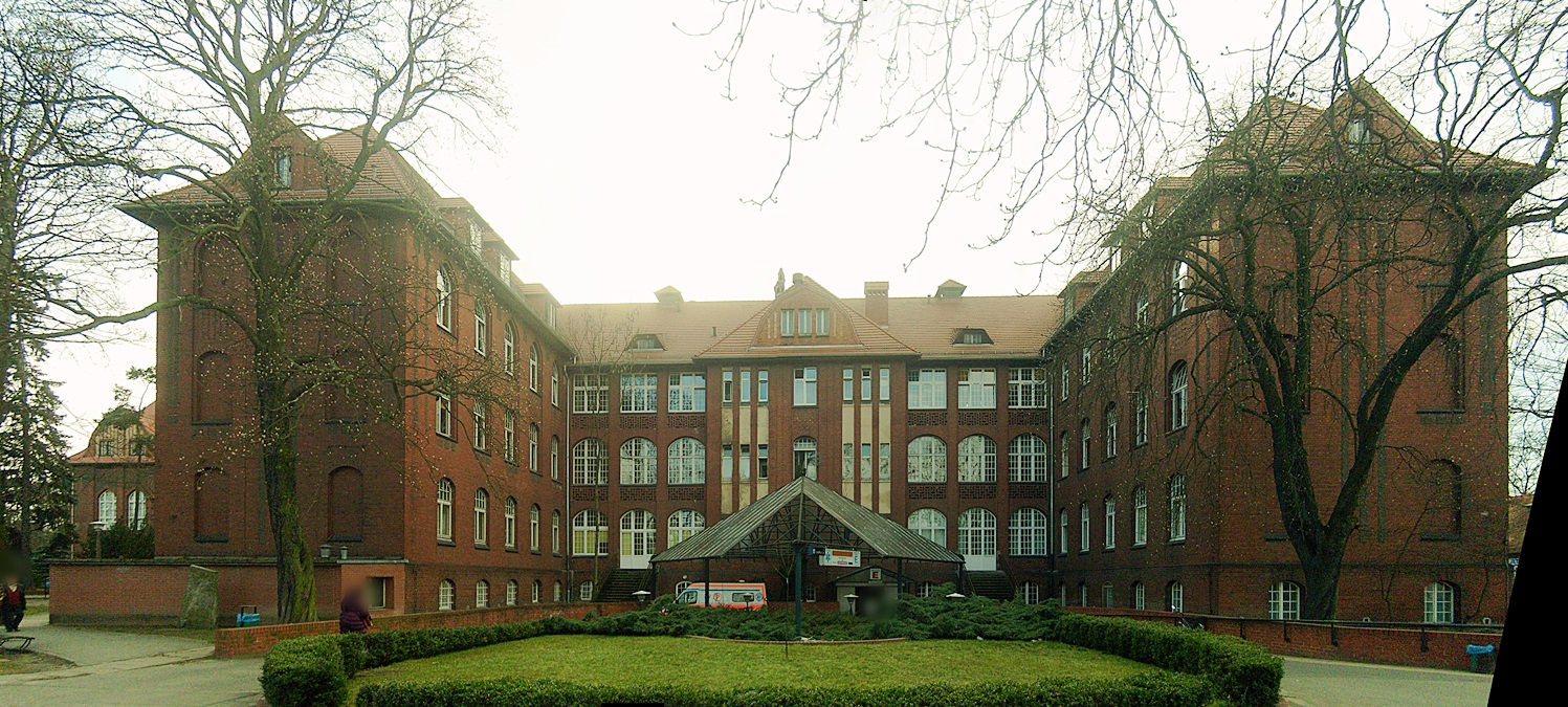 Poznań, Heliodor Święcicki Hospital; front